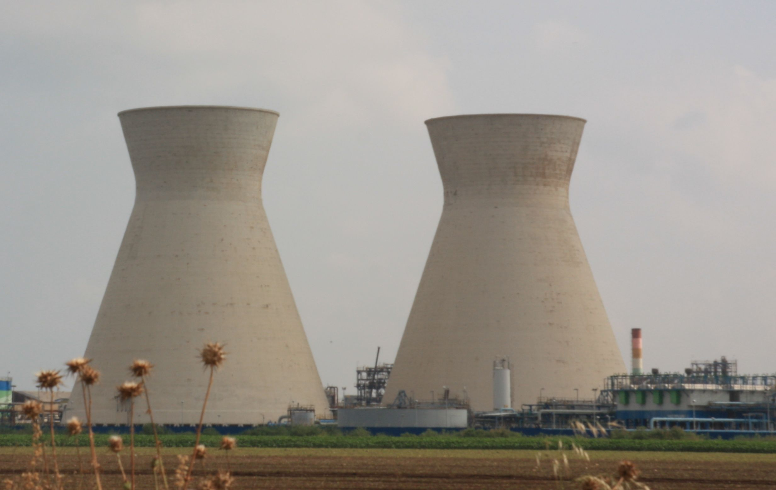 הלבניות, מתחם בז"ן, מפרץ חיפה